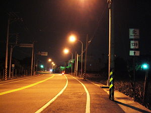 中文（台灣）: 晚上的縣道139(芬園鄉大彰路)假日很多人都會來這騎腳踏車